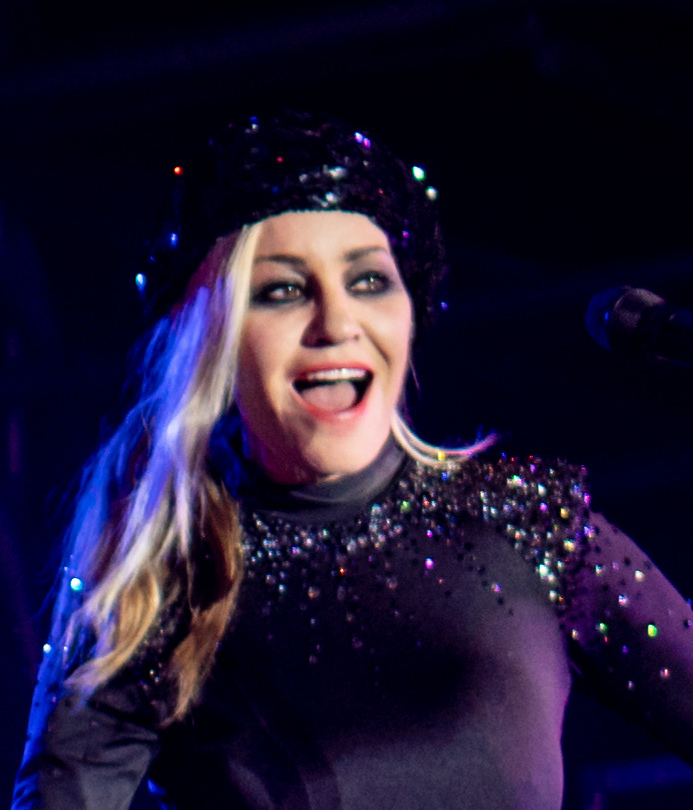 BanaRamaAmpthill290618-26